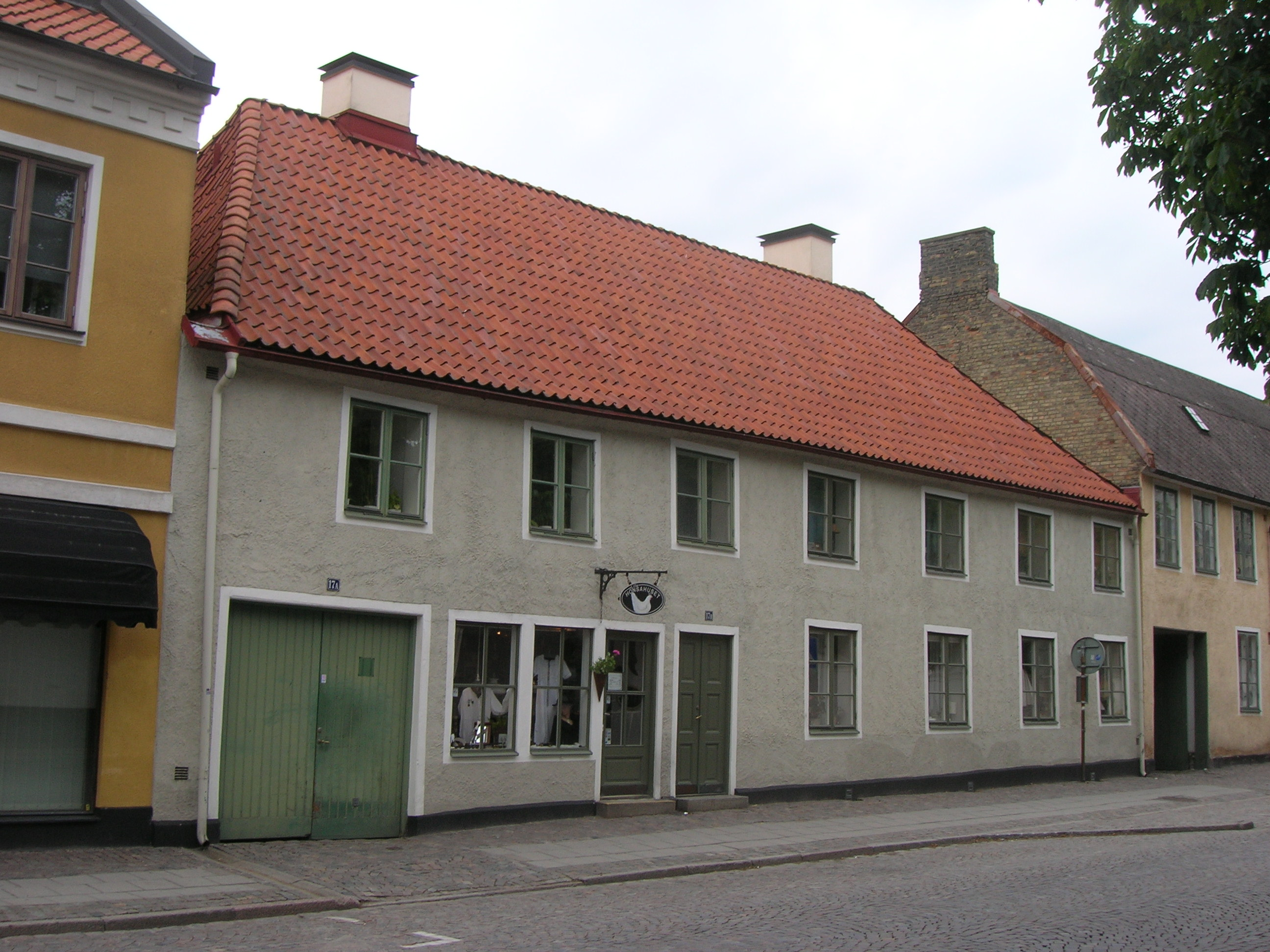 Kjederquistska gården, kulturminnesmärkt hus på Bredgatan 17 i kvarteret Sankt Peter i Lund, Skåne, Sverige.